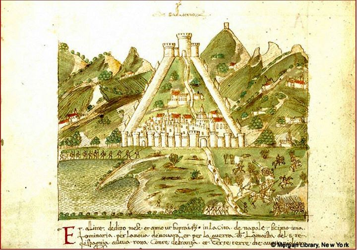 L'assedio di Salerno nella cronaca aragonese del 1498-1503 : Pierpont Morgan Library. Manuscript. M.801. Fol. 125v, Cronaca della Napoli Aragonese: Scene, Siege of Salerno.